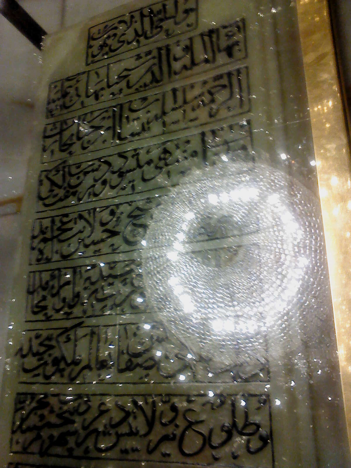 قبر شیخ بهایی در مرقد امام رضا(ع)